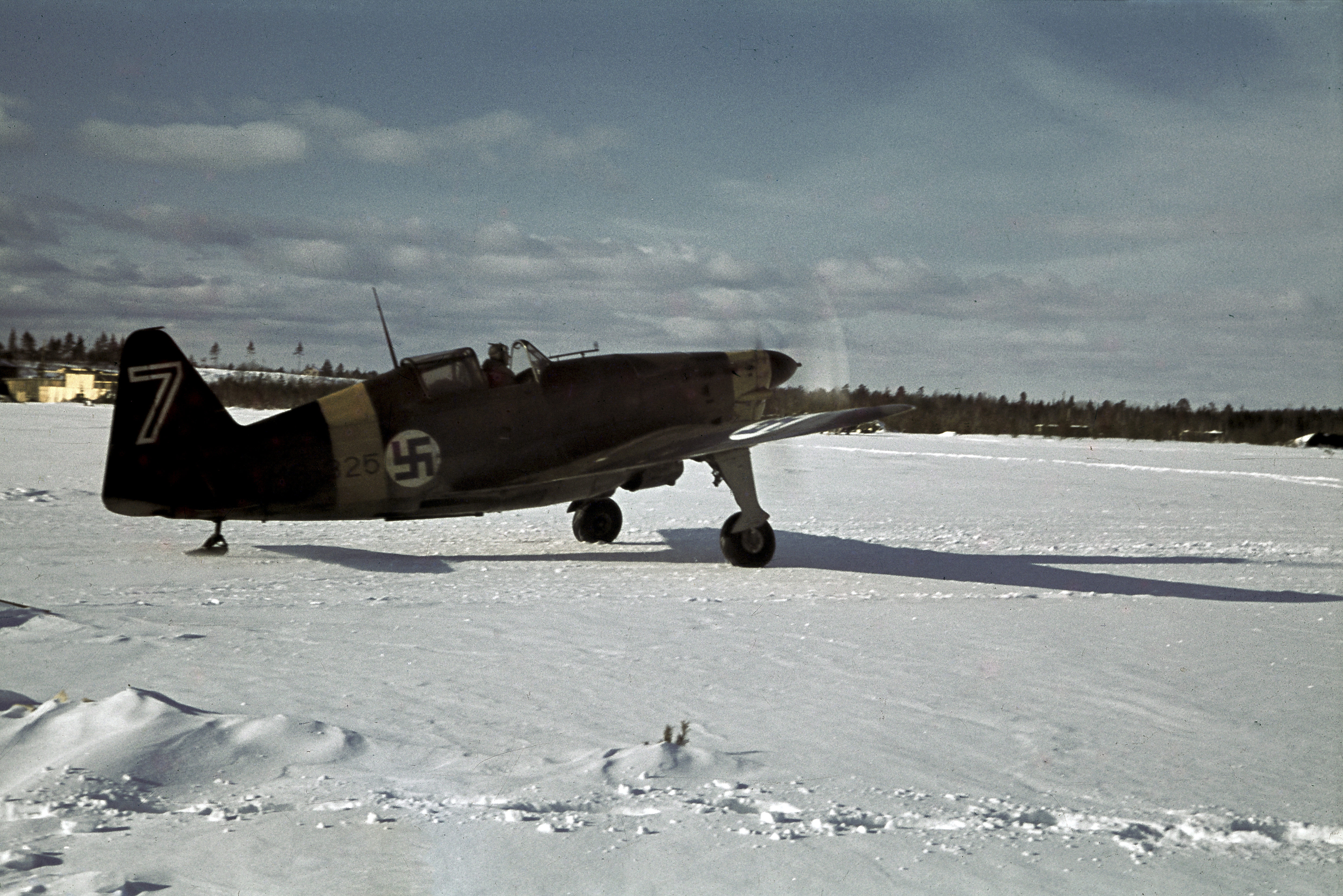 Morane-Saulnier M.S.406 lähtemässä partiolennolle, Äänislinna, Viitana 17.3.1942